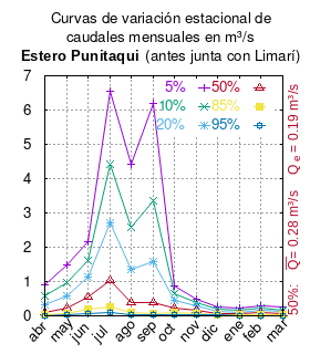 Curvas de variación estacional del estero Punitaqui antes de junta con el río Limarí. # Dirección General de Aguas # Diagnóstico y clasificación de los cursos y cuerpos de agua según objetivos de calidad. Cuenca del río Limarí. # Santiago de Chile # Ministerio de Obras Públicas (Chile) # 2004 # url: # urlarchivo: # Tabla 4.17: Estero Punitaqui antes junta Río Limarí, p.61 mes 5% 10% 20% 50% 85% 95% abr 0.919 0.576 0.327 0.111 0.029 0.013 may 1.486 0.974 0.583 0.219 0.066 0.032 jun 2.164 1.627 1.141 0.555 0.190 0.074 jul 6.552 4.418 2.725 1.045 0.268 0.083 ago 4.418 2.593 1.360 0.396 0.087 0.036 sep 6.205 3.353 1.591 0.383 0.066 0.024 oct 0.869 0.658 0.467 0.235 0.088 0.041 nov 0.490 0.395 0.296 0.155 0.055 0.026 dic 0.263 0.194 0.135 0.067 0.028 0.017 ene 0.216 0.160 0.111 0.055 0.023 0.014 feb 0.276 0.223 0.168 0.089 0.033 0.015 mar 0.244 0.174 0.115 0.053 0.020 0.011 This plot was created with Gnuplot.